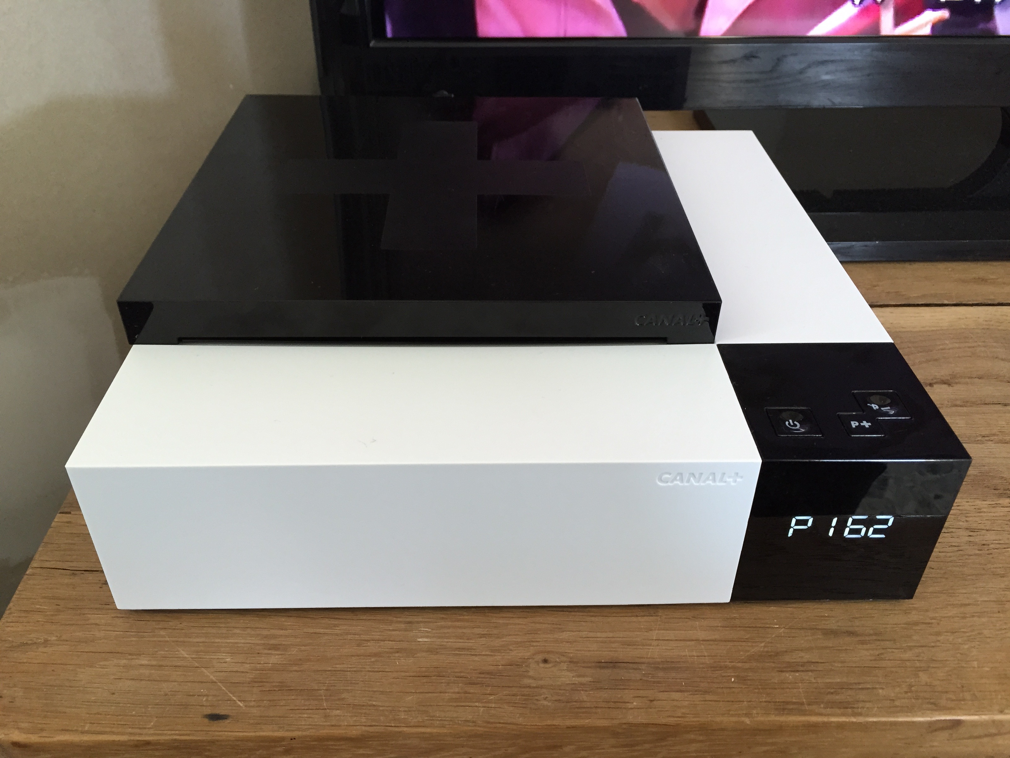 Ceci est une image du décodeur de canalsat.